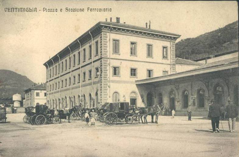 Stazione ferroviaria di Ventimiglia, il vecchio fabbricato viaggiatori